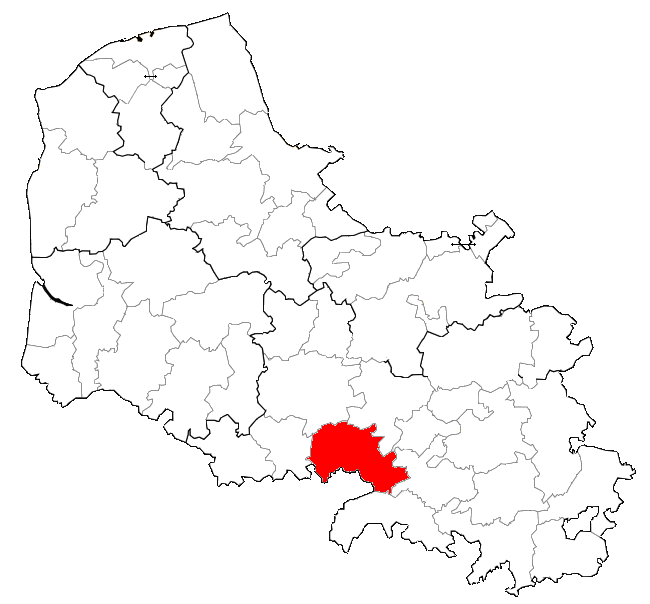 Localisation de la CCVS dans le 62.